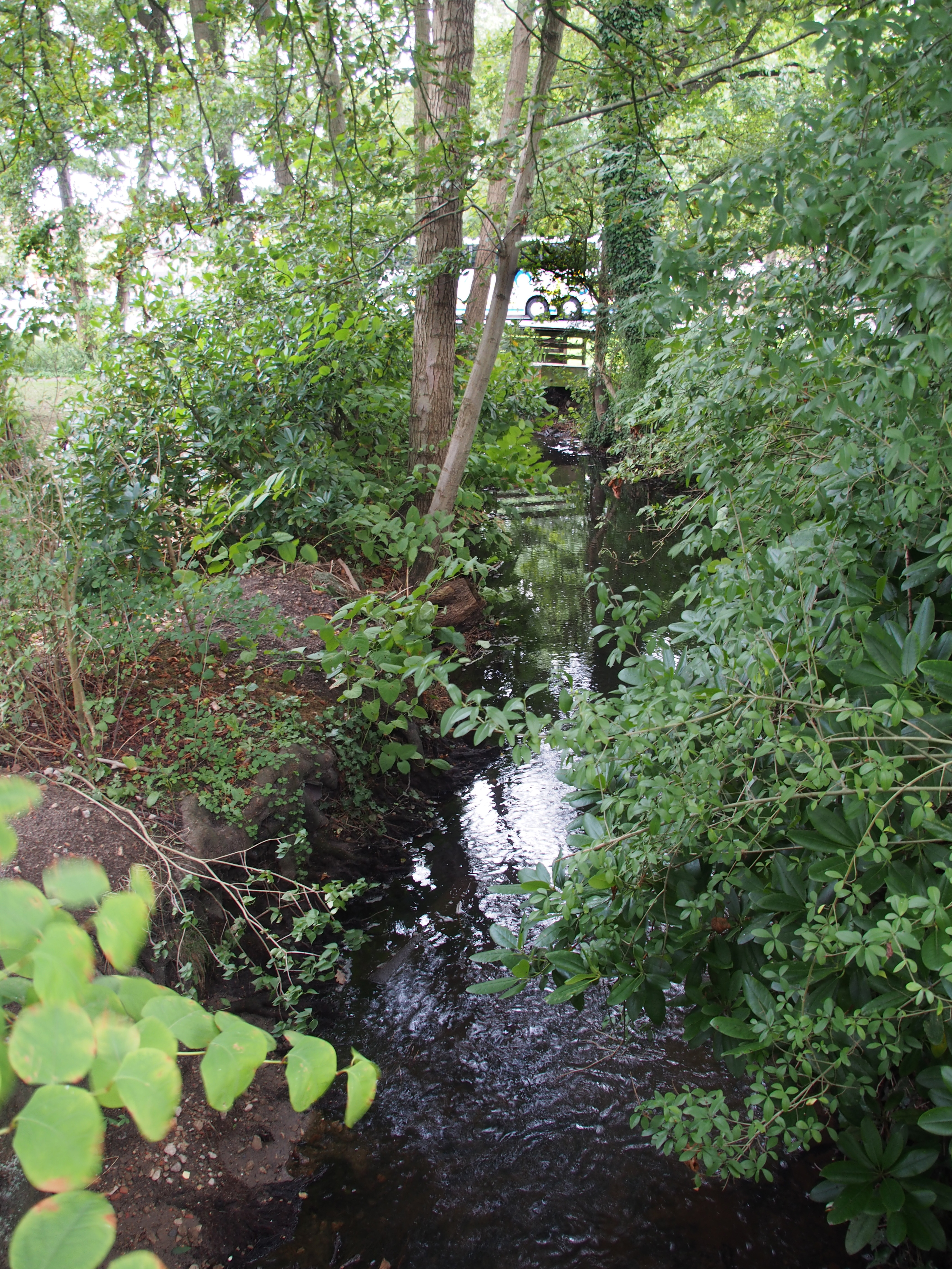 Der Fluss Soltau im Stadtbereich von Soltau